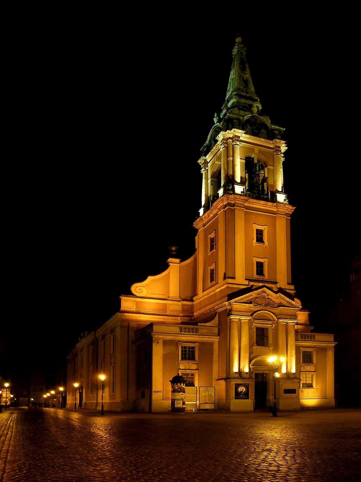 Dawny kościół ewangielicki, ob. rzym.-kat. akademicki pw. Świętego Ducha w Toruniu